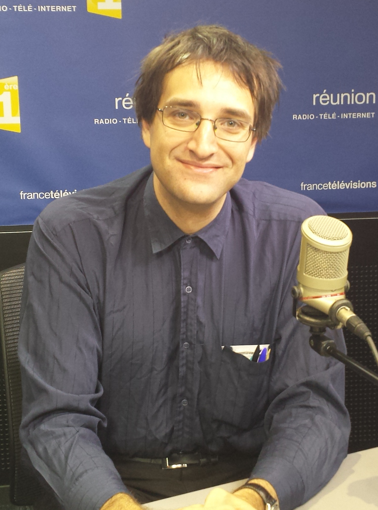 Josef Schovanec, dans le studio radio de Réunion 1ère, dont il était l'invité de la matinale, le 6 avril 2016